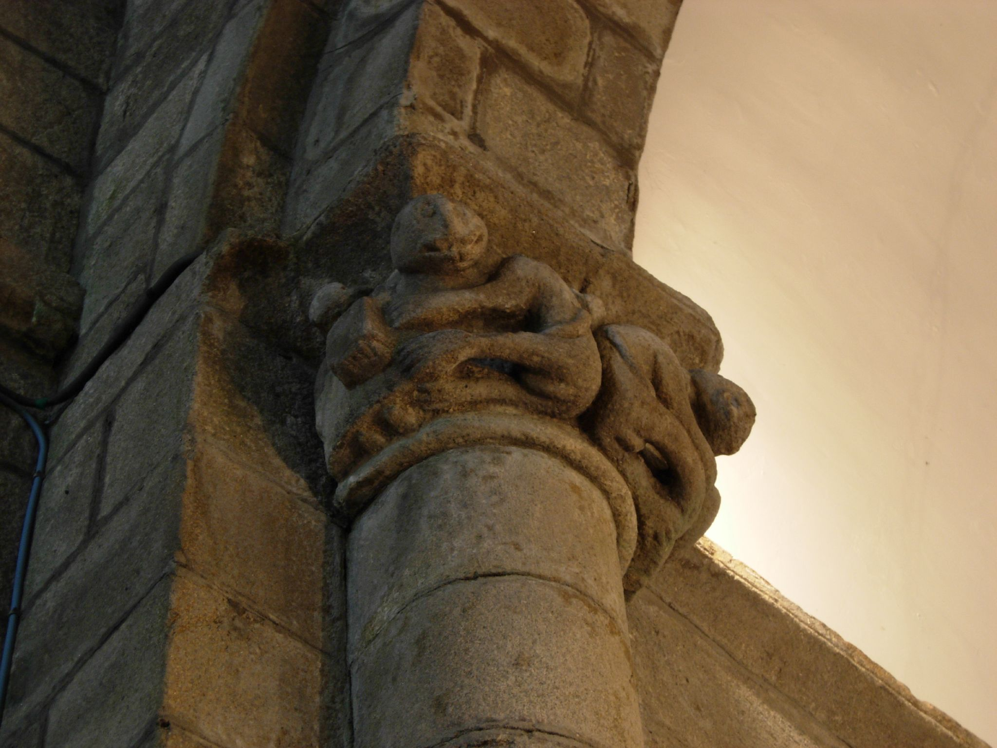 Capitel do arco triunfal da Igrexa de San Martiño de Sobrán - Vilagarcía de Arousa - Pontevedra